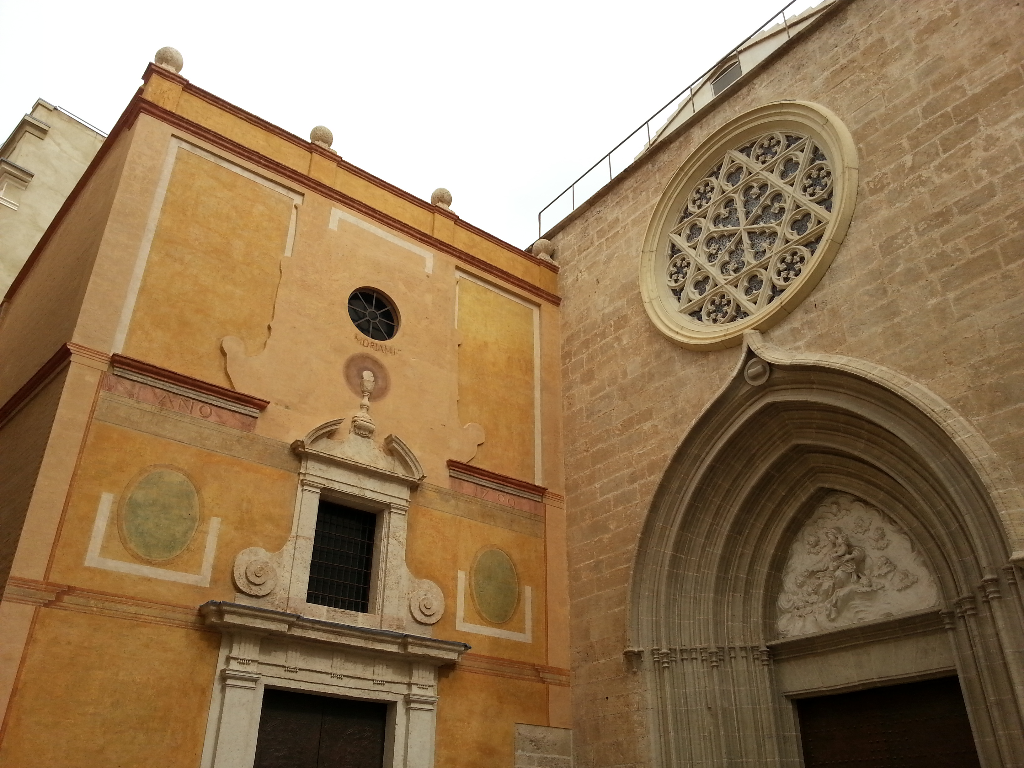 Església de Sant Nicolau de València.